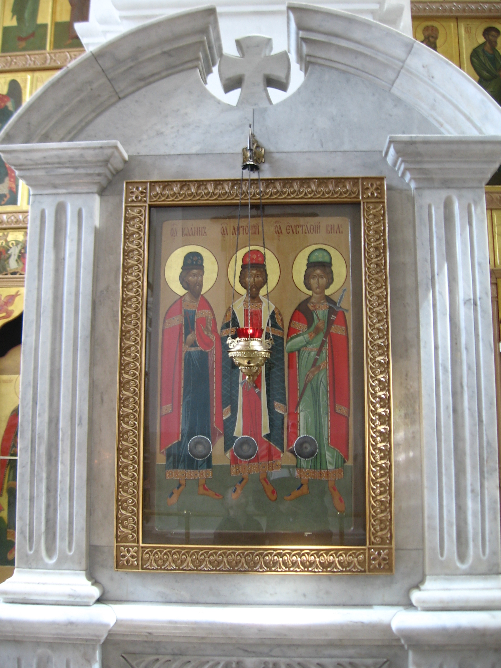 Икона Виленских мучеников. Минск, Собор святых апостолов Петра и Павла